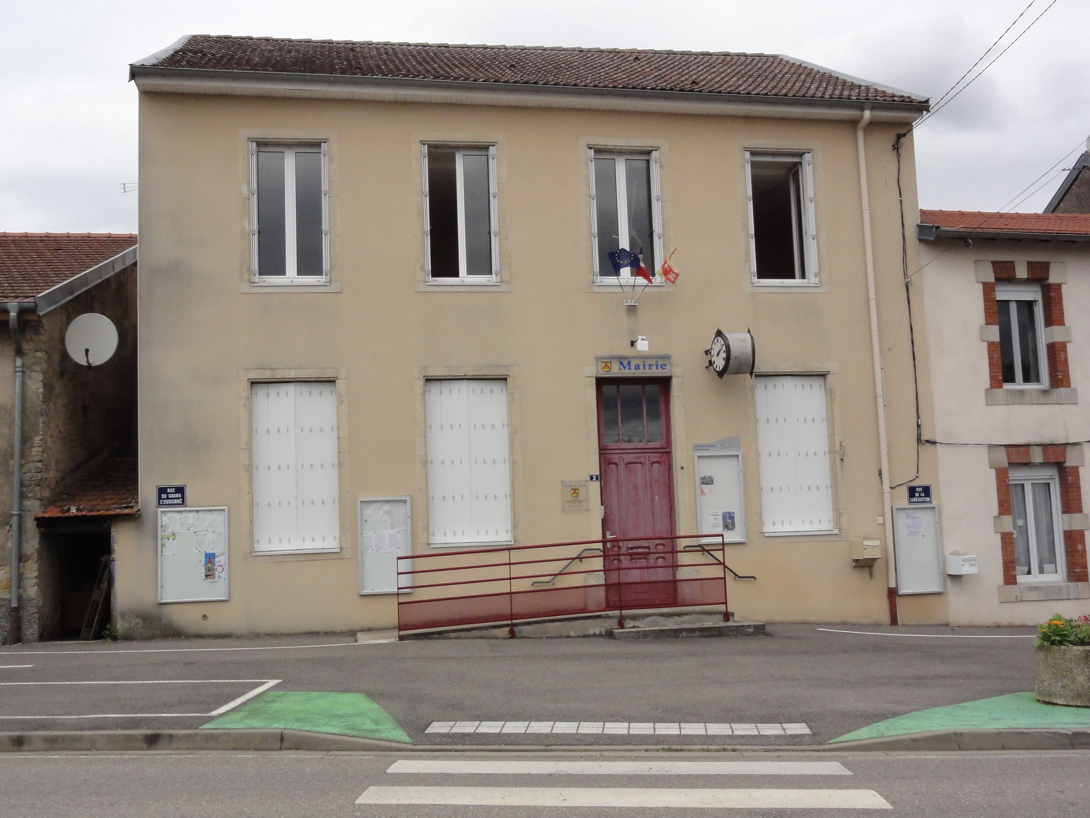 Erbéviller-sur-Amezule (M-et-M) mairie